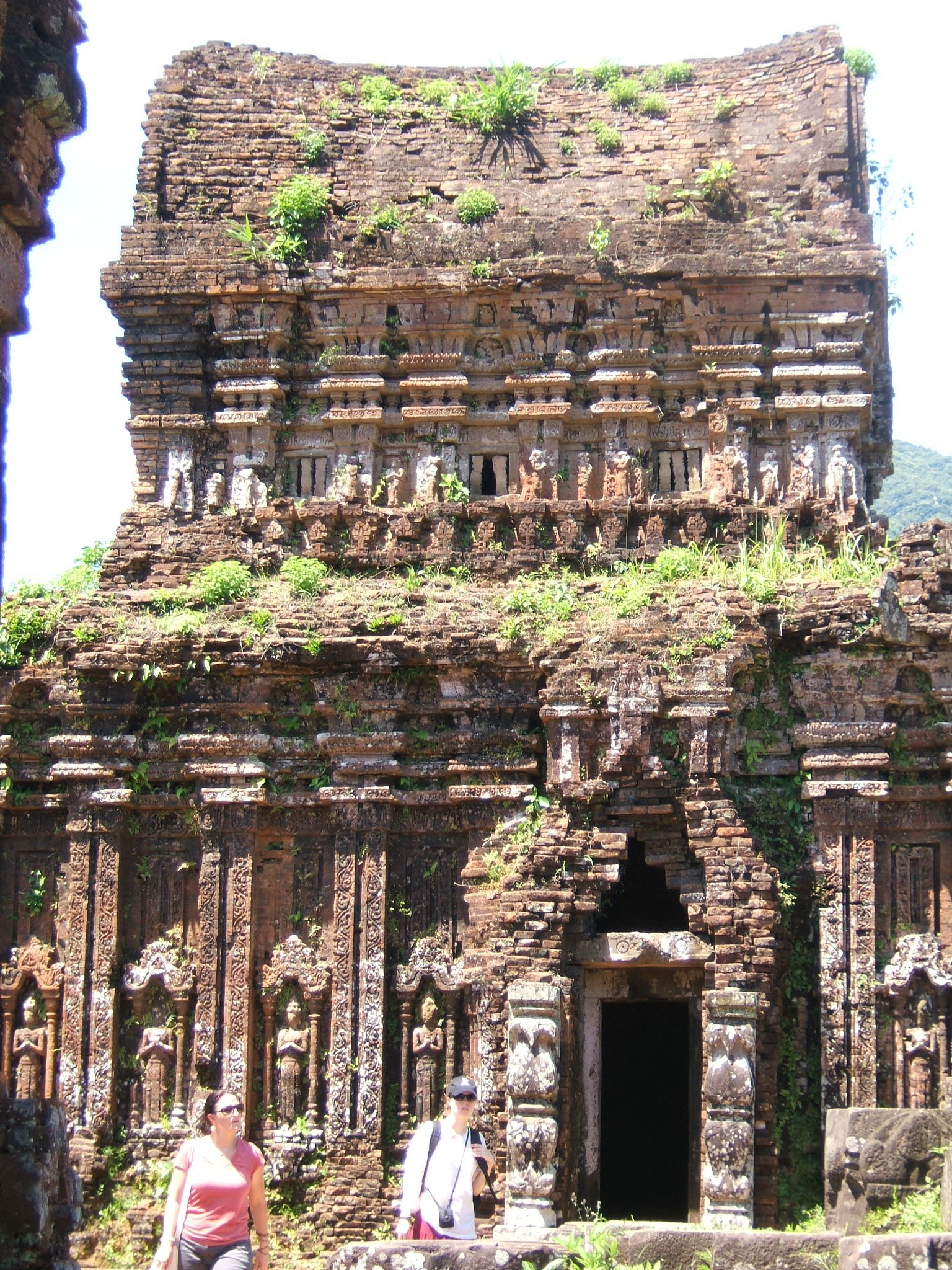 Tháp hình thuyền tại Thánh địa Mỹ Sơn, Việt Nam